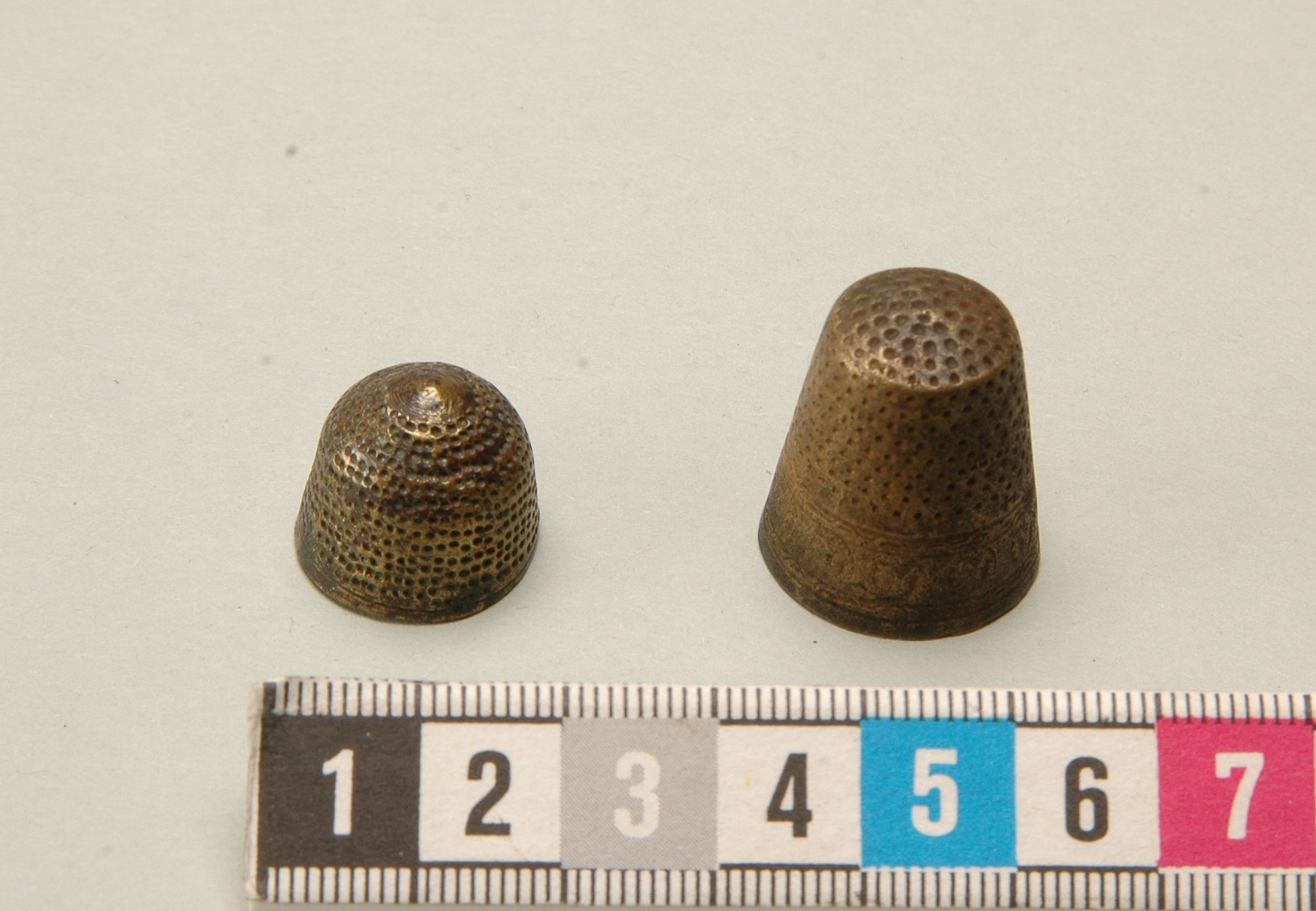 Två fingerborgar av mässing, från Ragnhildsholmen i Bohuslän. högmedeltid (1250 e.Kr. - 1350 e.Kr.)